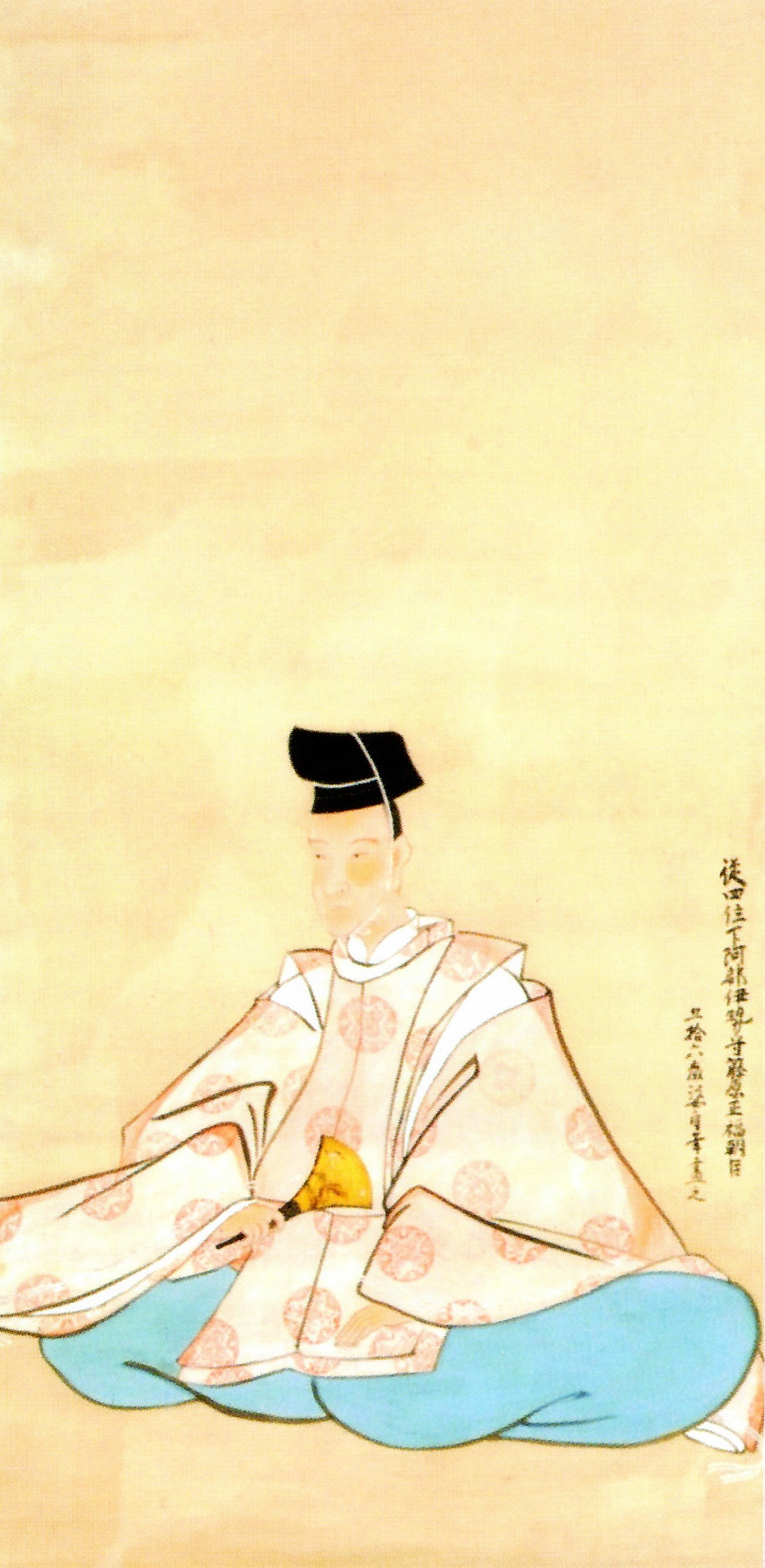 阿部正福の自画像。